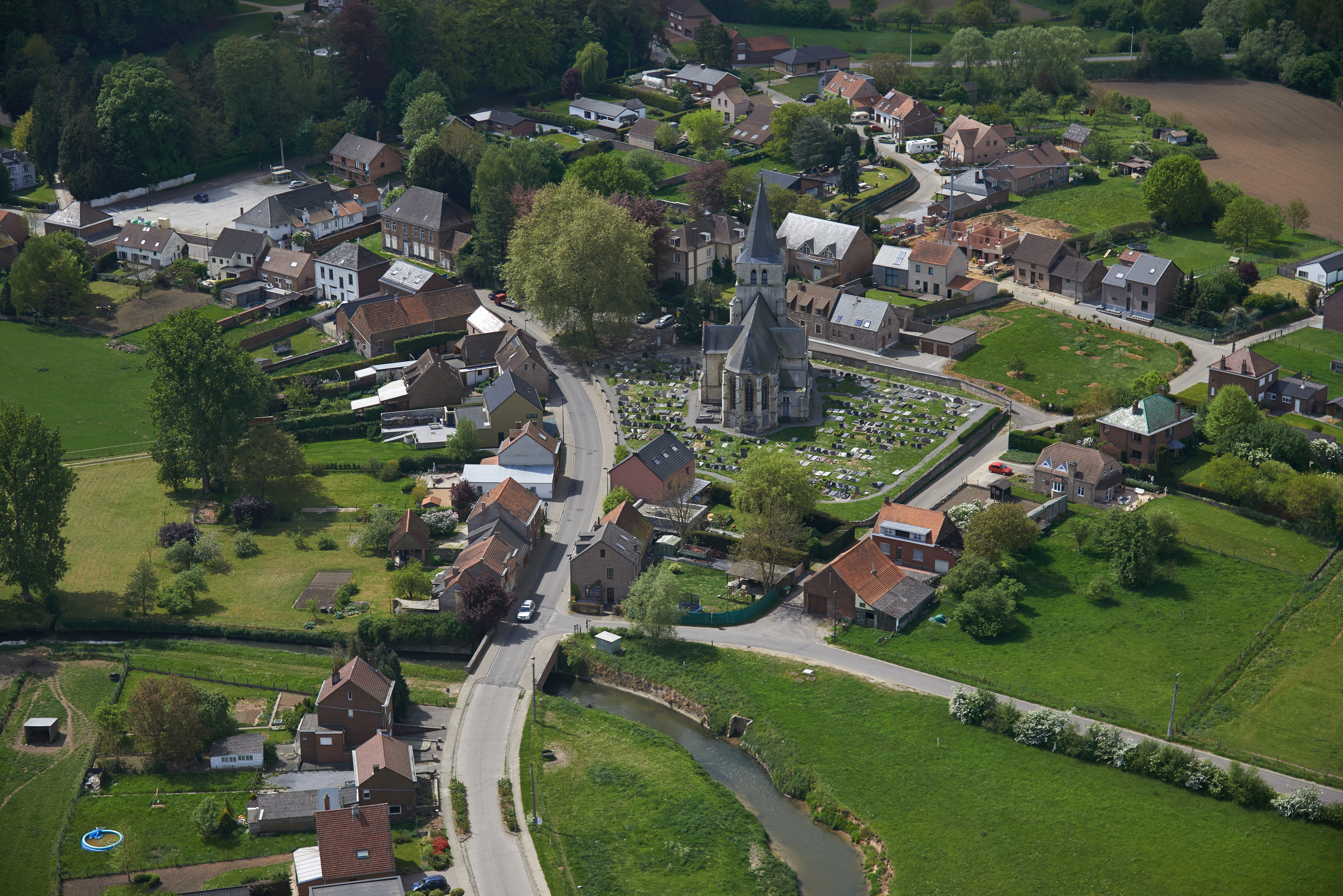 Luchtfoto van de omgeving rond de Sint-Agathakerk in Sint-Agatha-Rode, België